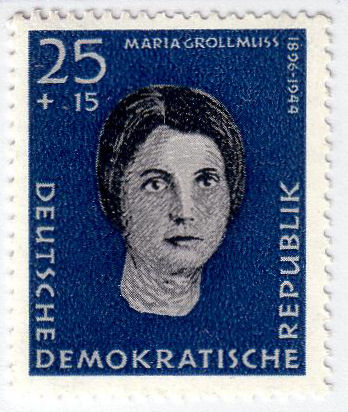 Maria Grollmuß – Briefmarke der Deutschen Post der DDR (Michel-Nr. 719). Auflage: 1.100.000 Hornjoserbsce: Marja Grólmusec